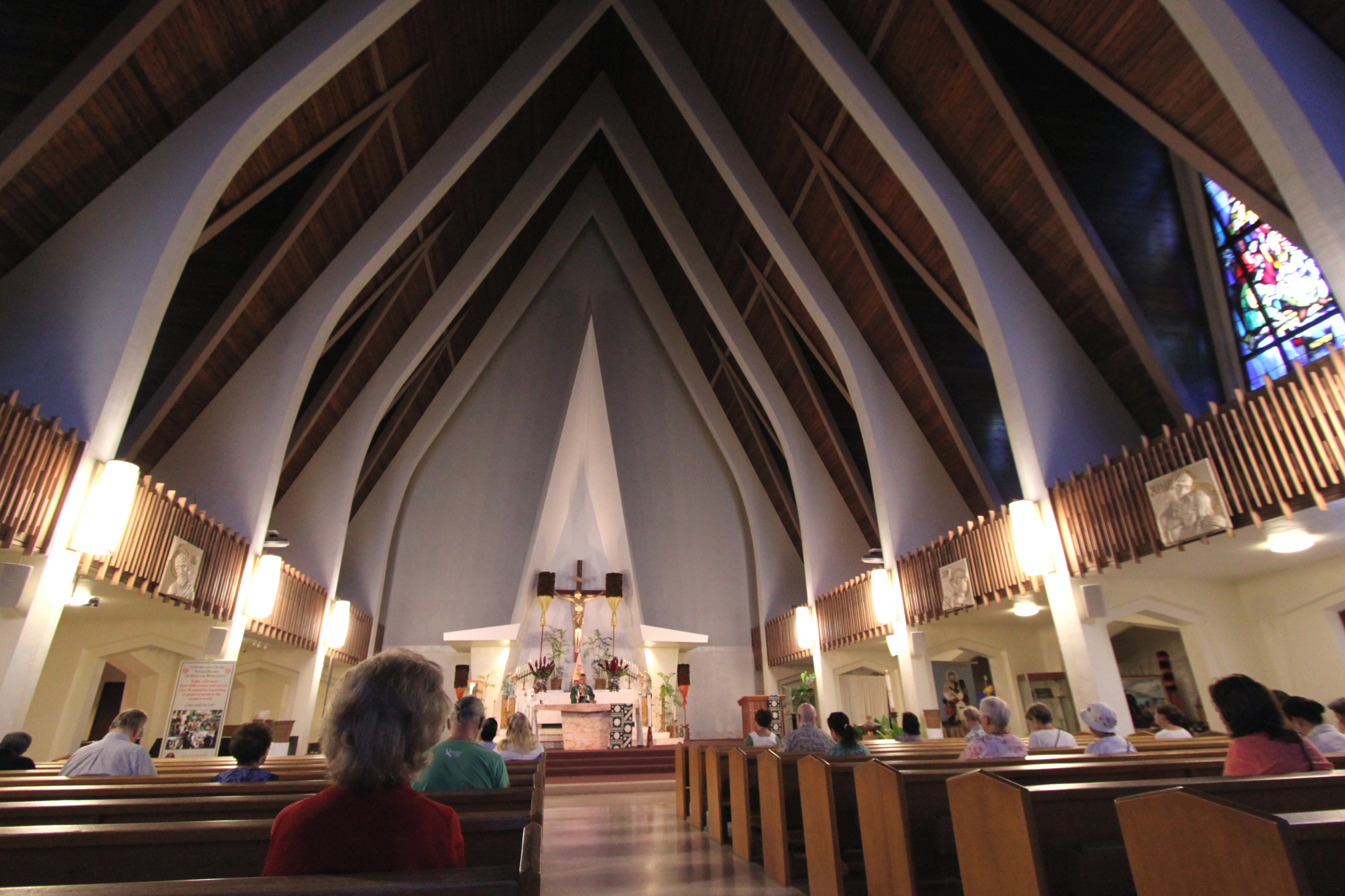 Waikiki Beach, Honolulu, Hawai'i